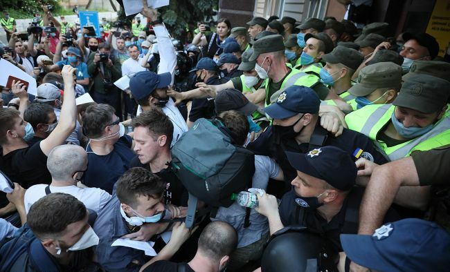 Сутички під Шевченківським судом на підтримку Стерненка (12.06.2020)